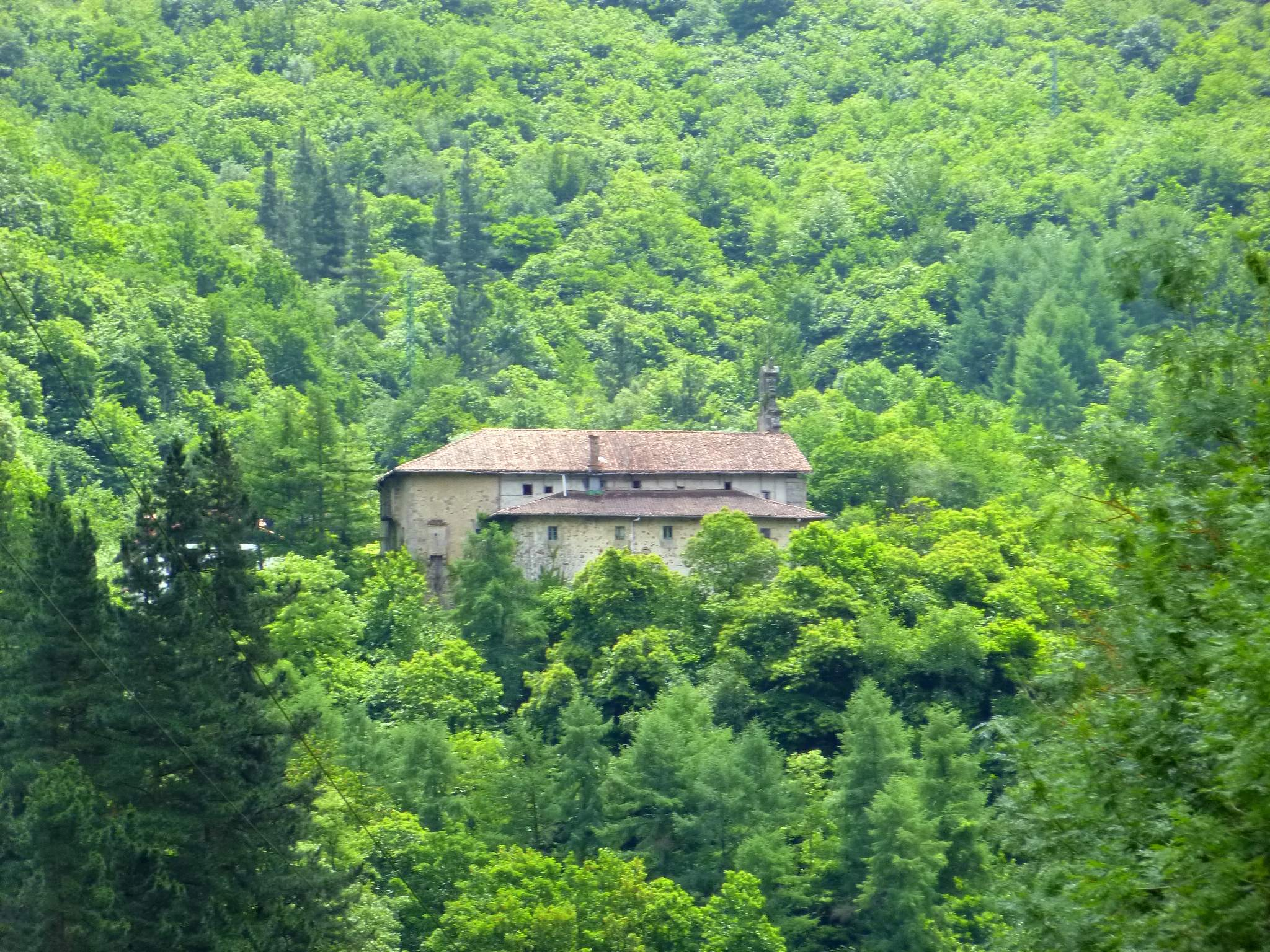 Santuario de Santa María de Dorleta, en Salinas de Léniz (Leintz-Gatzaga), Gipuzkoa